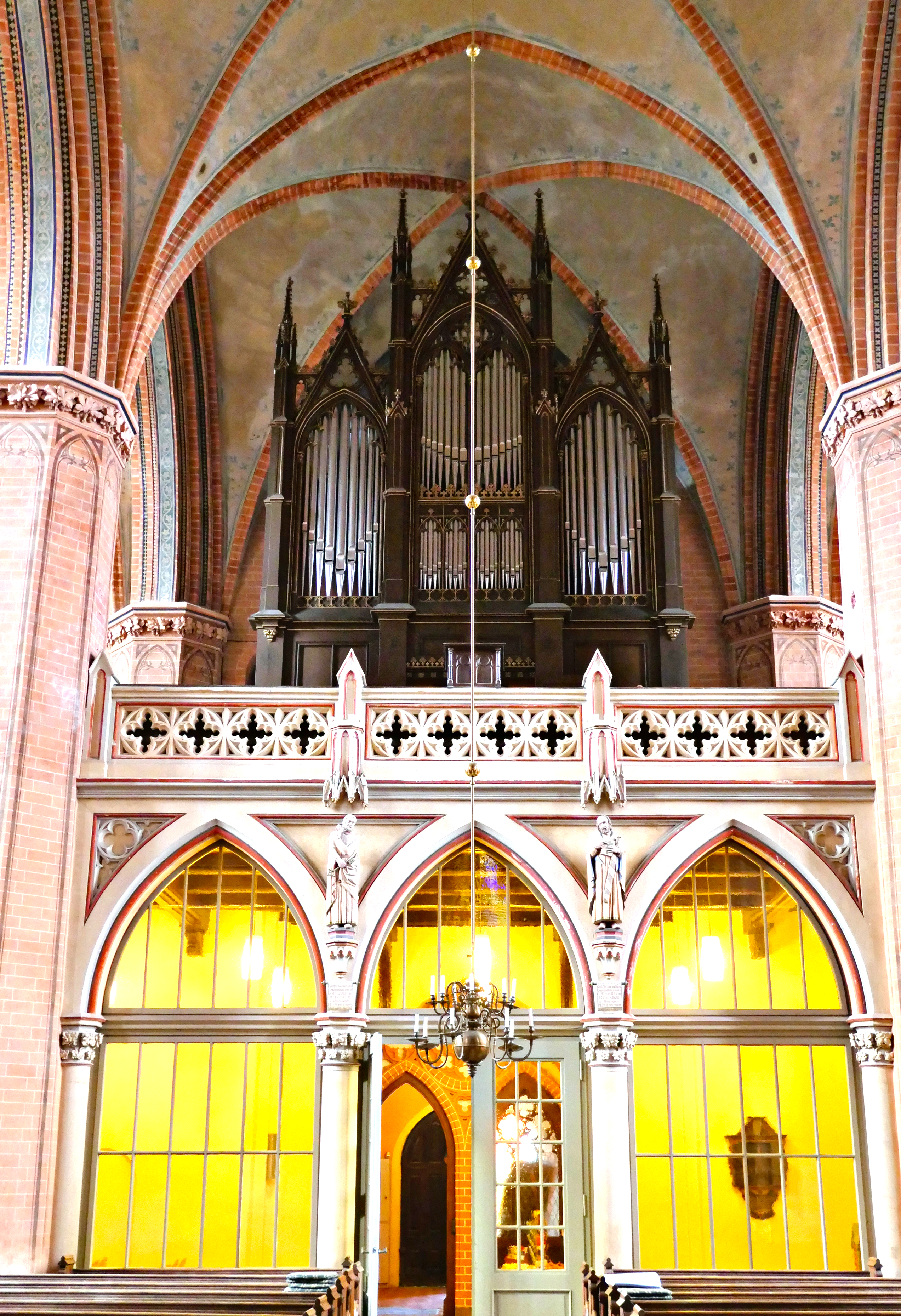 Orgel in St.-Peter-Kirche in Altentreptow, Landkreis Mecklenburgische Seenplatte, Mecklenburg-Vorpommern, Deutschland